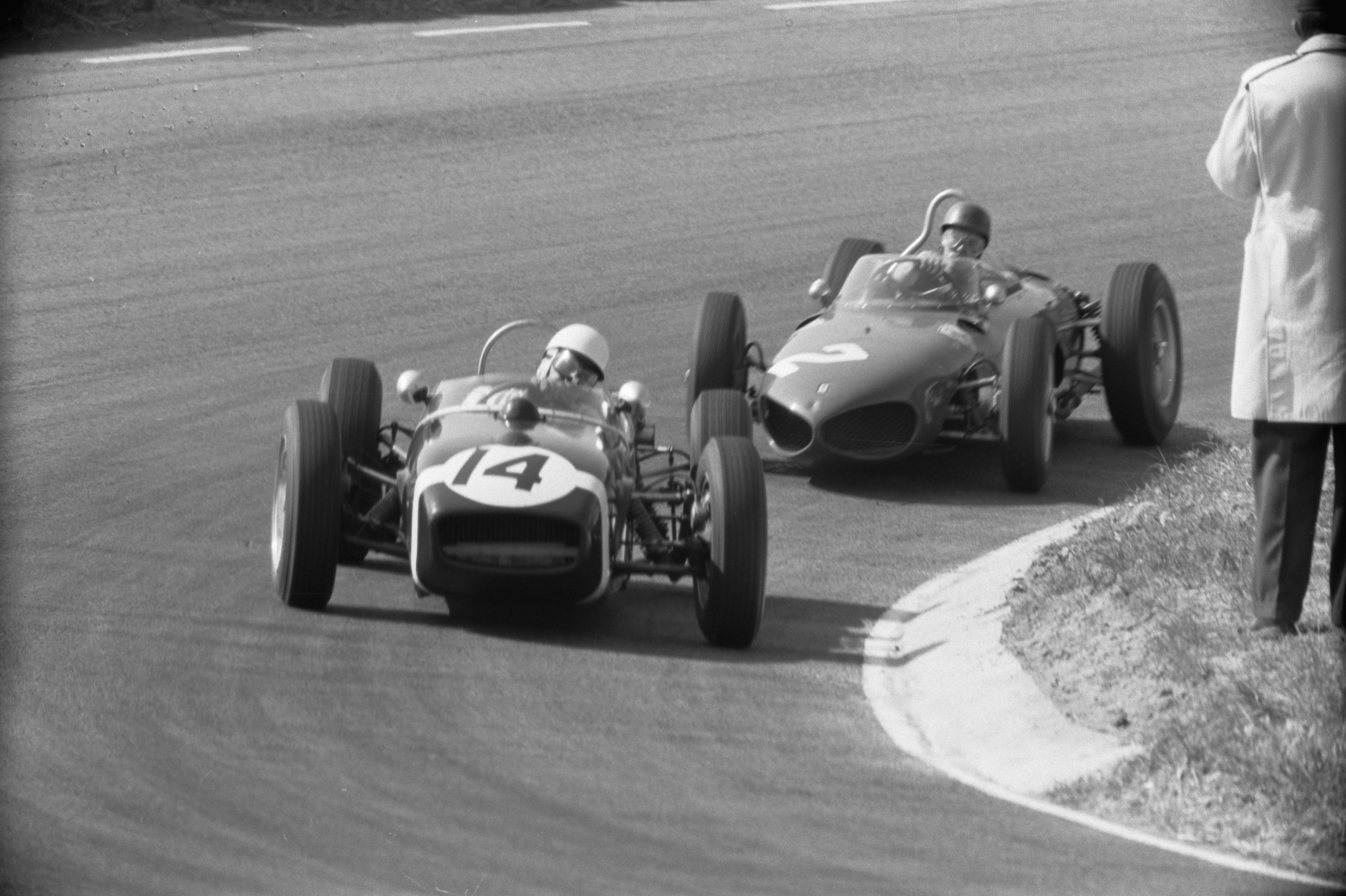 Collectie / Archief : Fotocollectie Anefo Reportage / Serie : Grand Prix Zandvoort 1961 Beschrijving : Wagens op de baan Datum : 22 mei 1961 Locatie : Noord-Holland, Zandvoort Trefwoorden : autoraces, autosport Fotograaf : Fotograaf Onbekend / Anefo Auteursrechthebbende : Nationaal Archief Materiaalsoort : Negatief (zwart/wit) Nummer archiefinventaris : bekijk toegang 2.24.01.05 Bestanddeelnummer : 912-5057 Reacties Geplaatst door Luc Ghys op 03 september 2016 - 11:01. Stirling Moss (Lotus) en Richie Ginther (Ferrari).